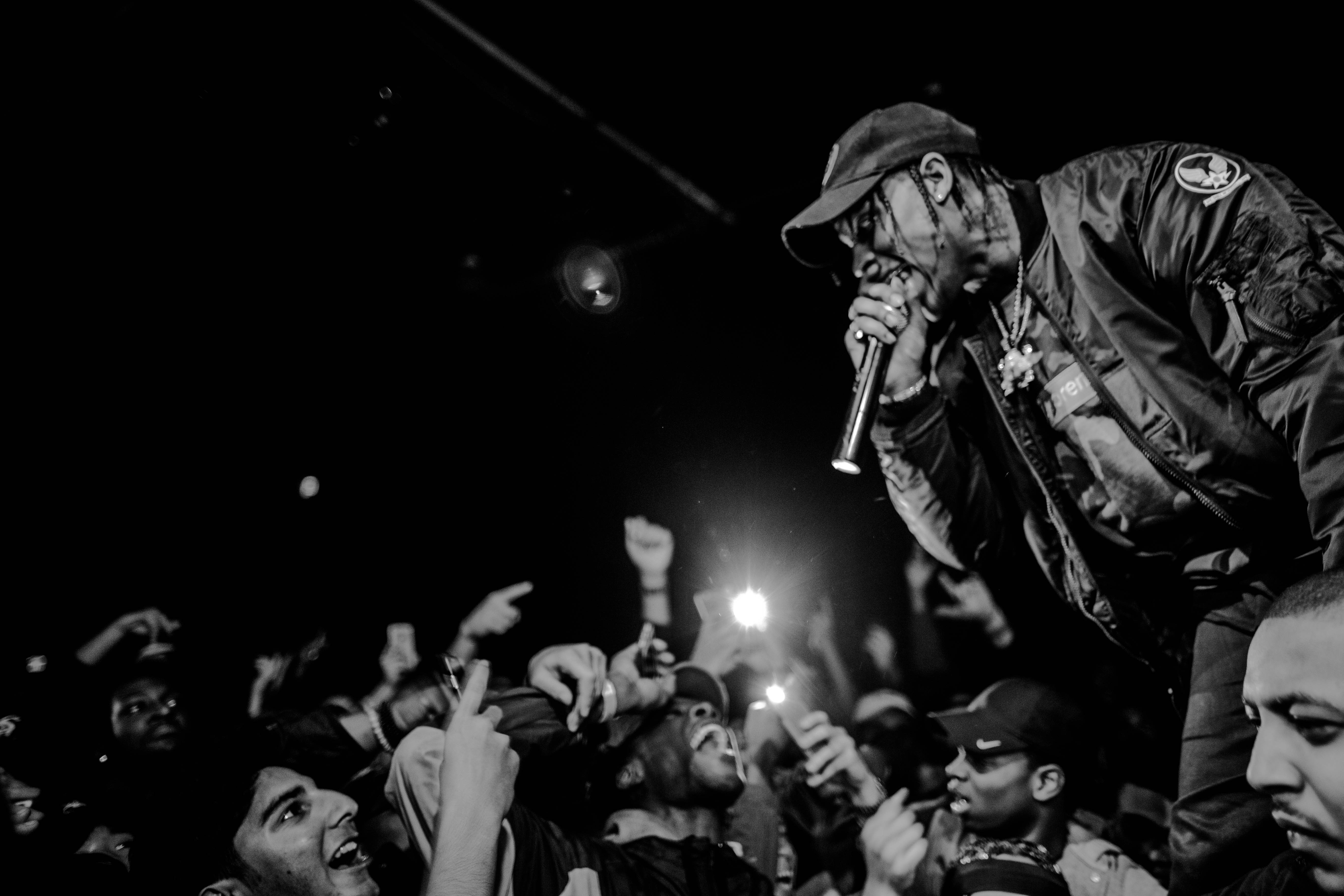 Рэпер Travis Scott, 2016